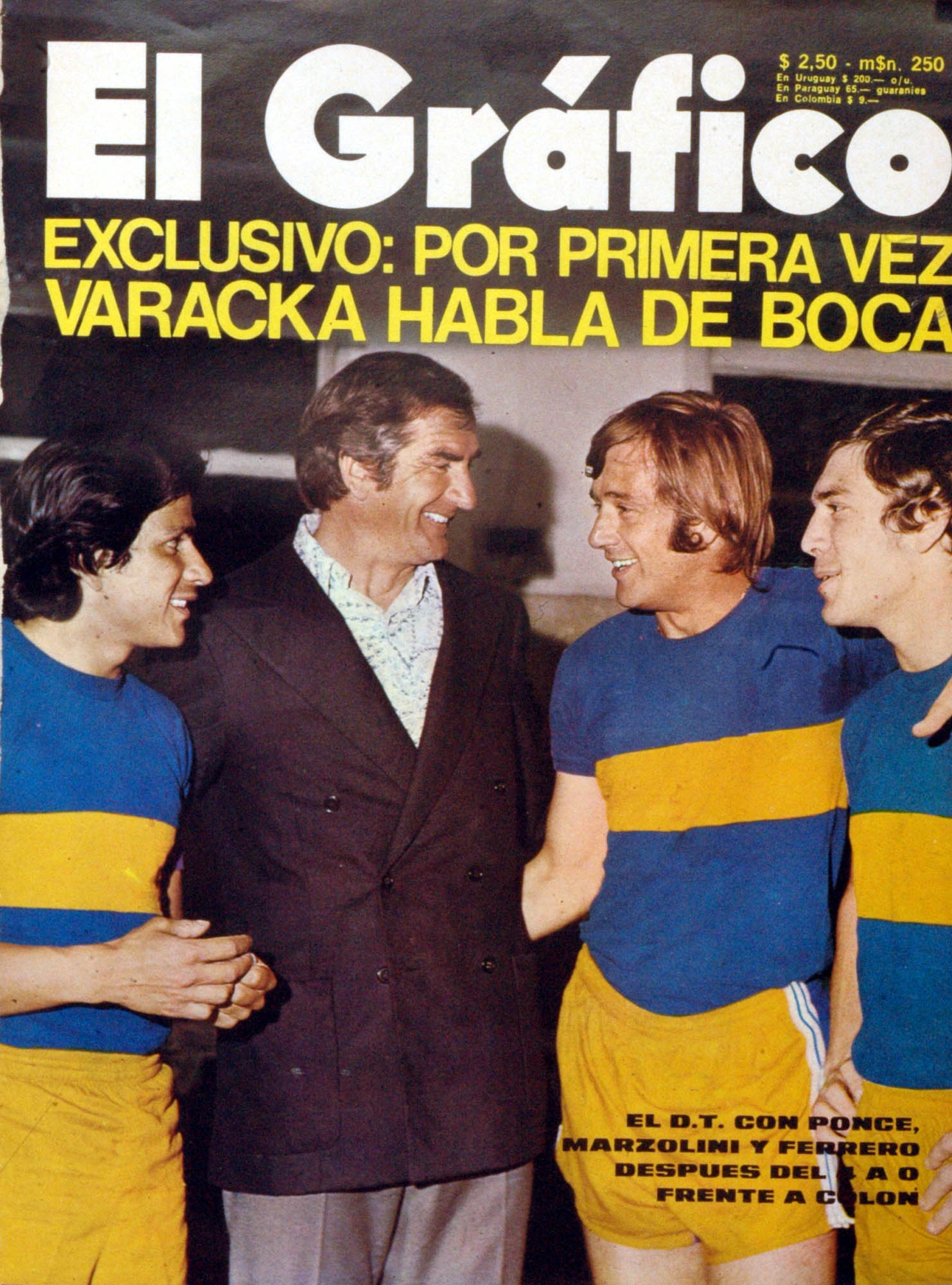 El Gráfico del 24 de Octubre de 1972. Edición 2768.